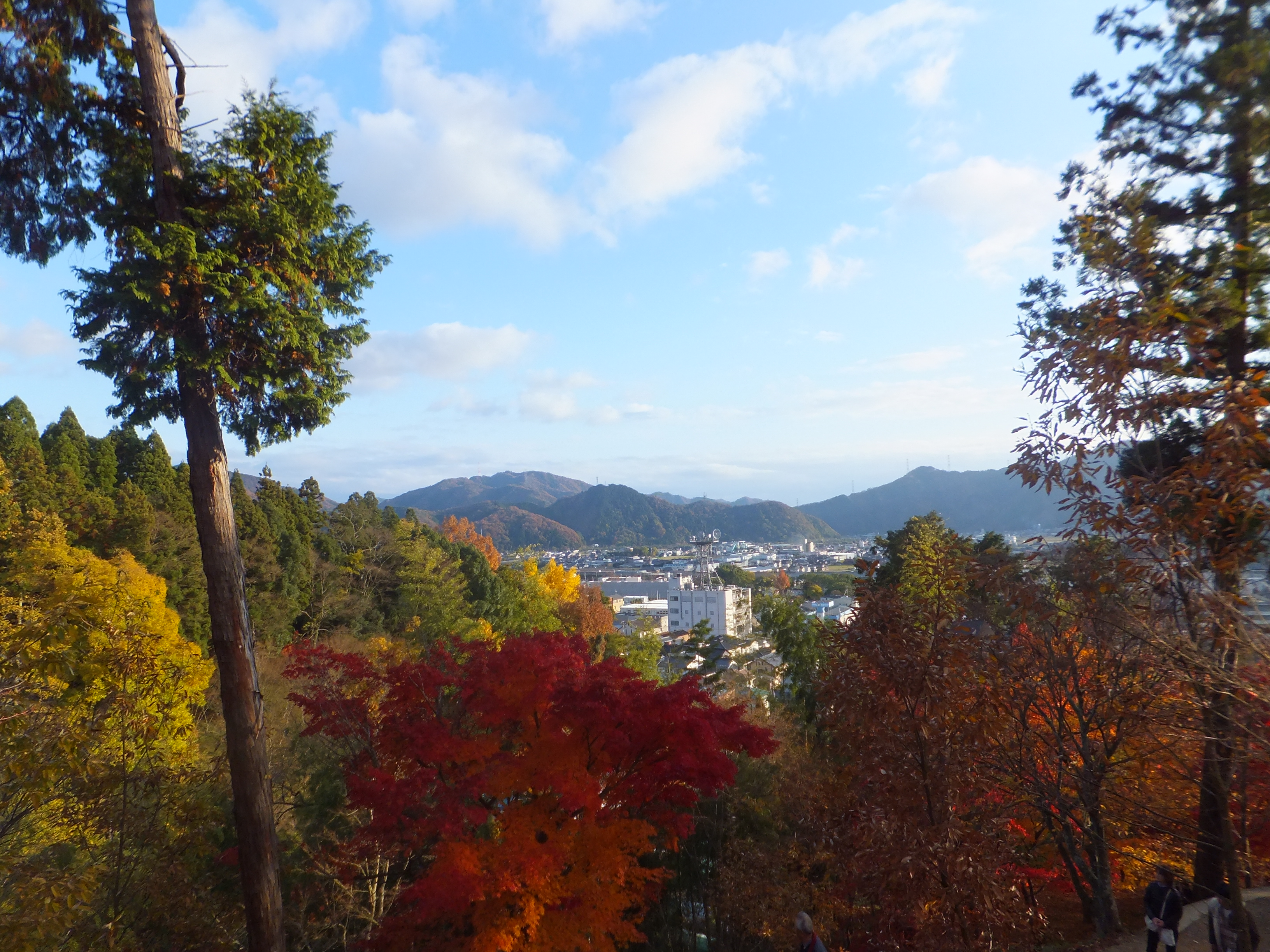 兵庫県宍粟市山崎町中心部